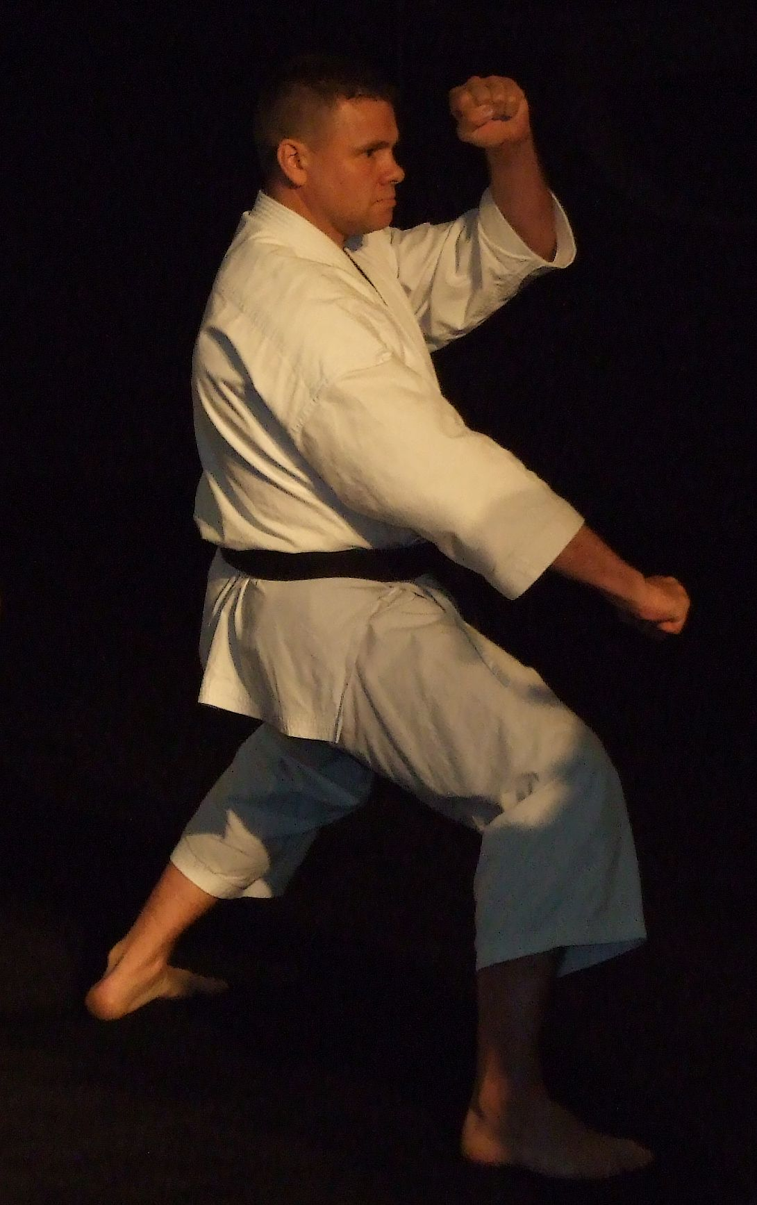 Krzysztof Neugebauer 5 DAN, karateka, jeden z najbardziej utytułowanych zawodników karate tradycyjnego na świecie.